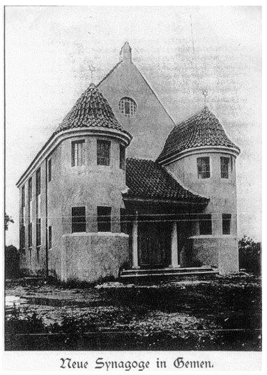 Ansichtskarte mit der Synagoge in Gemen (Borken)